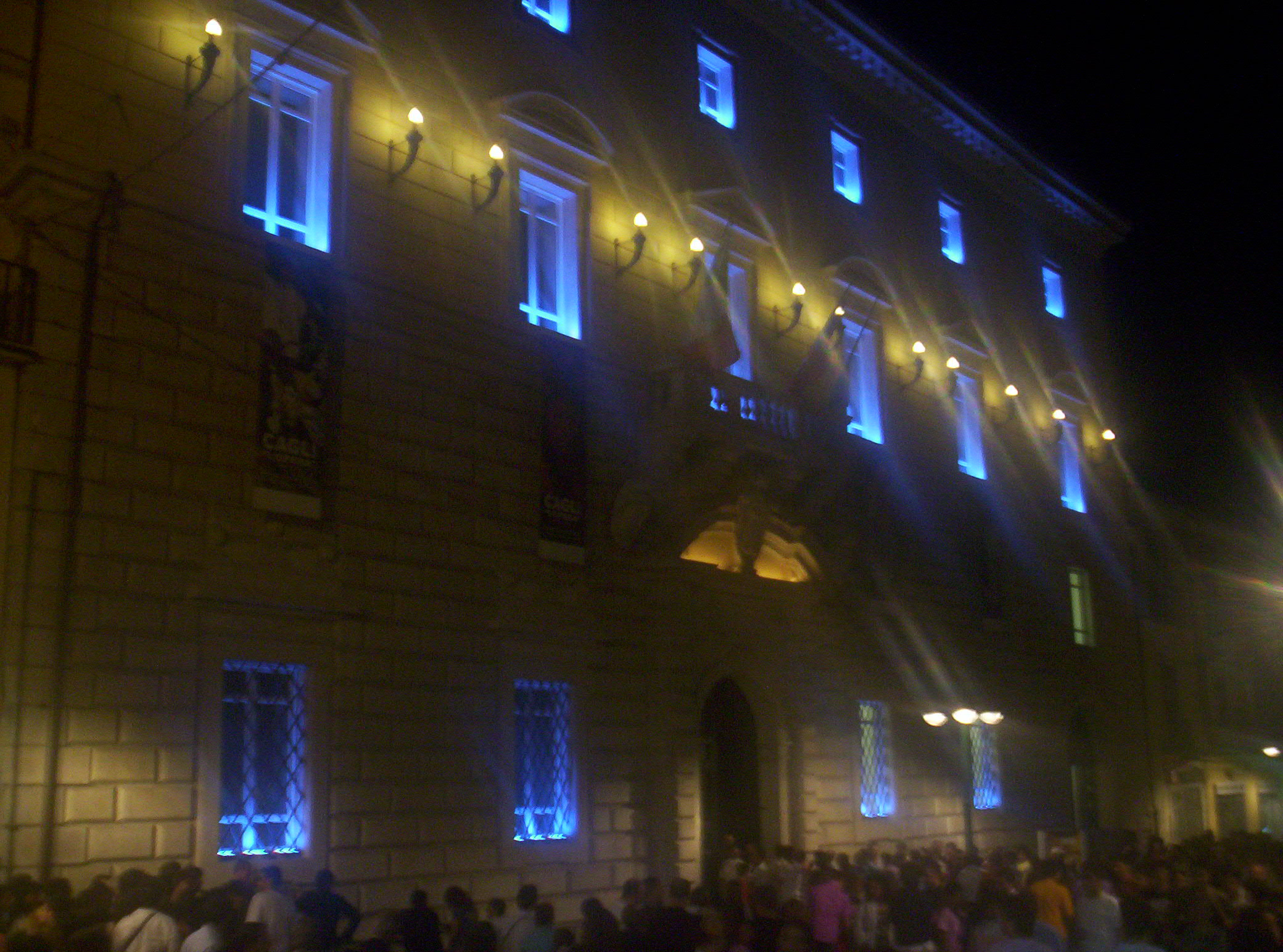 Foto scattata da me durante la manifestazione a Benevento di "Quattro notti e...più di luna piena"; la rilascio in pubblico dominio.